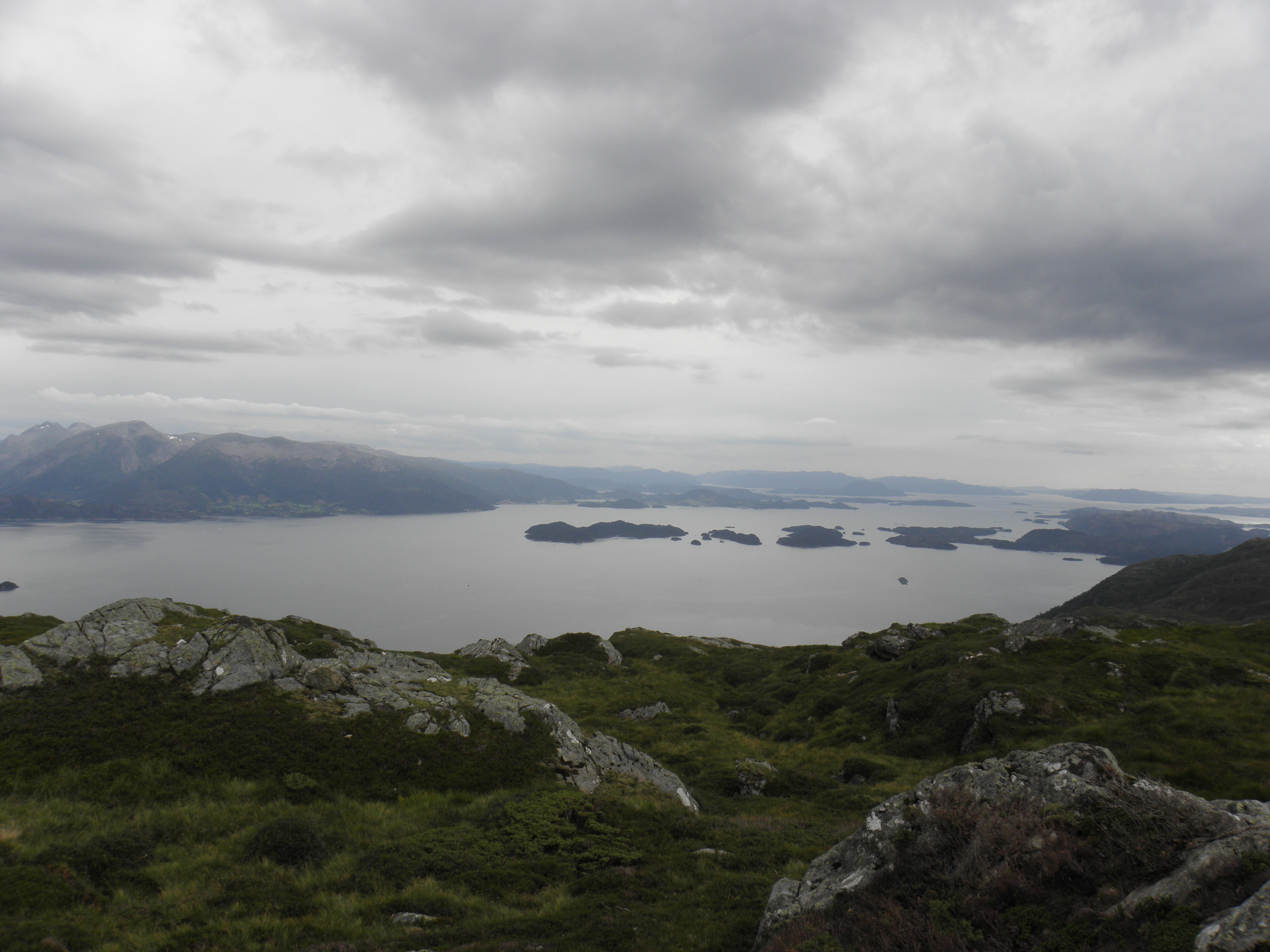 Utsyn frå Hovlandsnuten på Tysnes mot Onarheimsfjorden (i framgrunnen) og Kvinnherad.